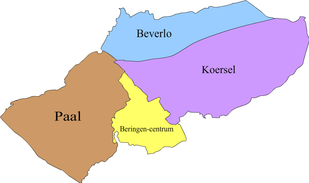 Kaart van Beringen met deelgemeenten